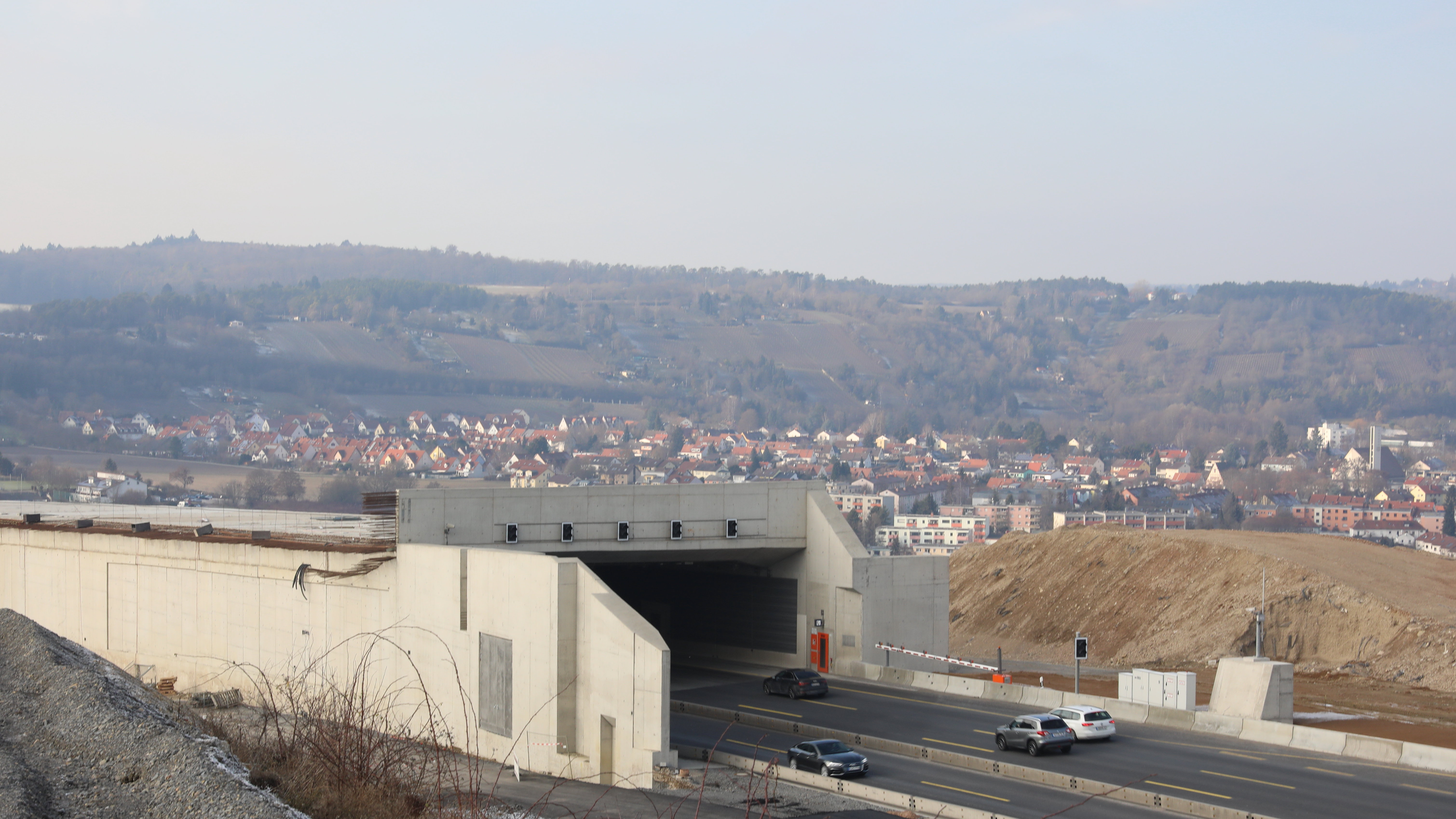 Katzenbergtunnel BAB 3, Würzburg